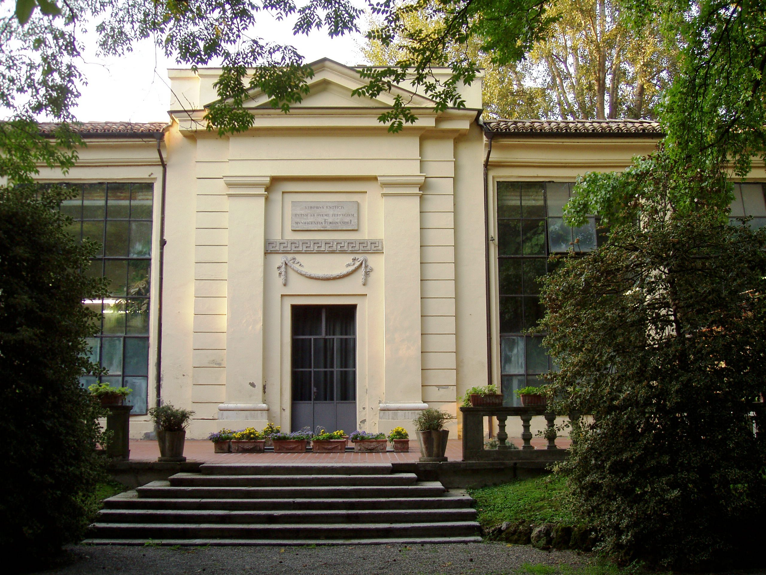 Orto Botanico dell'Università di Parma - glass houses. Parma, Italy.